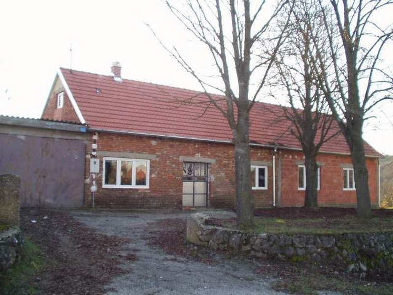 Kraljev Vrh - Dom